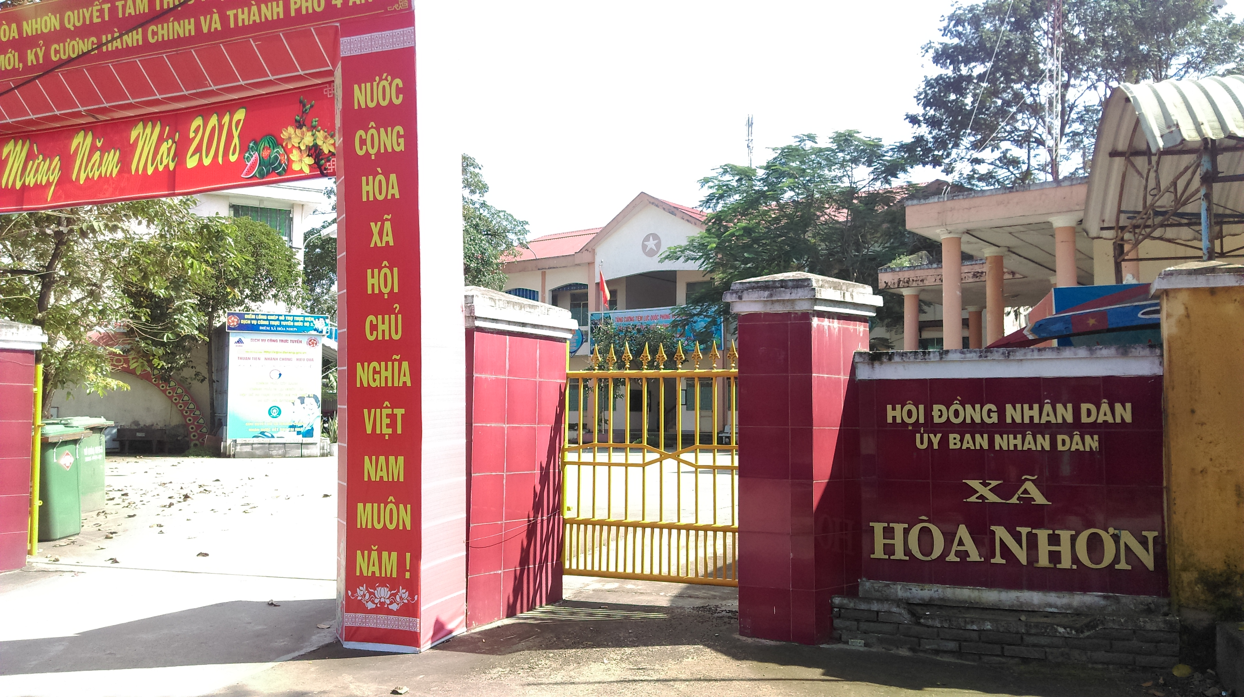 UBND xã Hòa Nhơn, Hòa Vang, Đà Nẵng